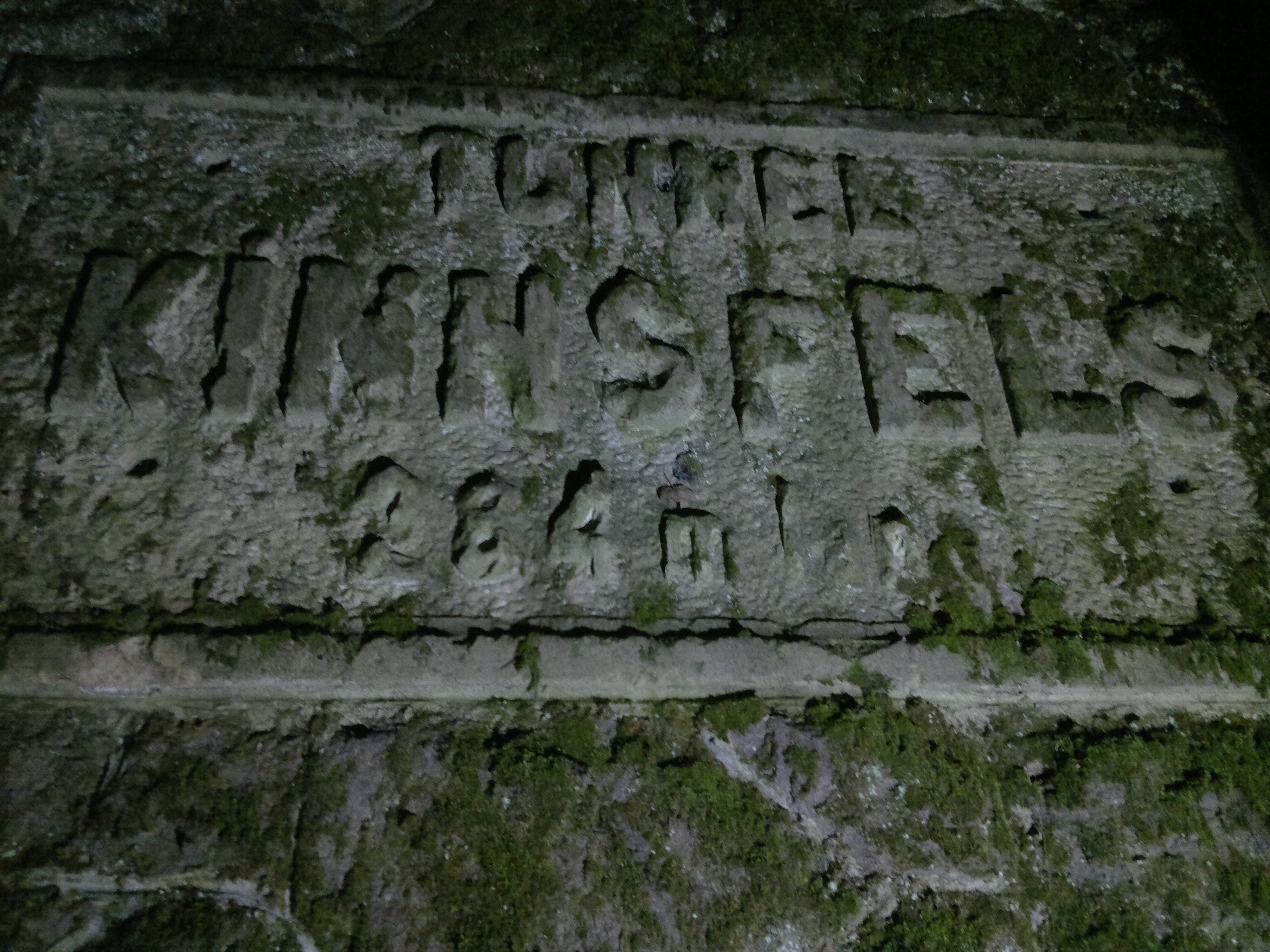 Tafel am Eingang des Kinnsfelstunnels bei Oberhausen an der Nahe; ehemalige (abgebaute) Bahnstrecke zwischen Odernheim am Glan und Bad Münster am Stein-Ebernburg (Glantalbahn); Eingang von Oberhausen an der Nahe kommend